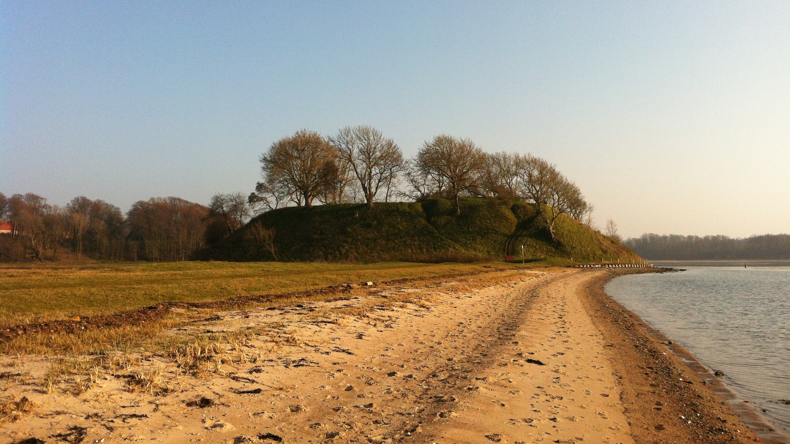 Udsigt over Hindsgavl Voldsted, marts 2014